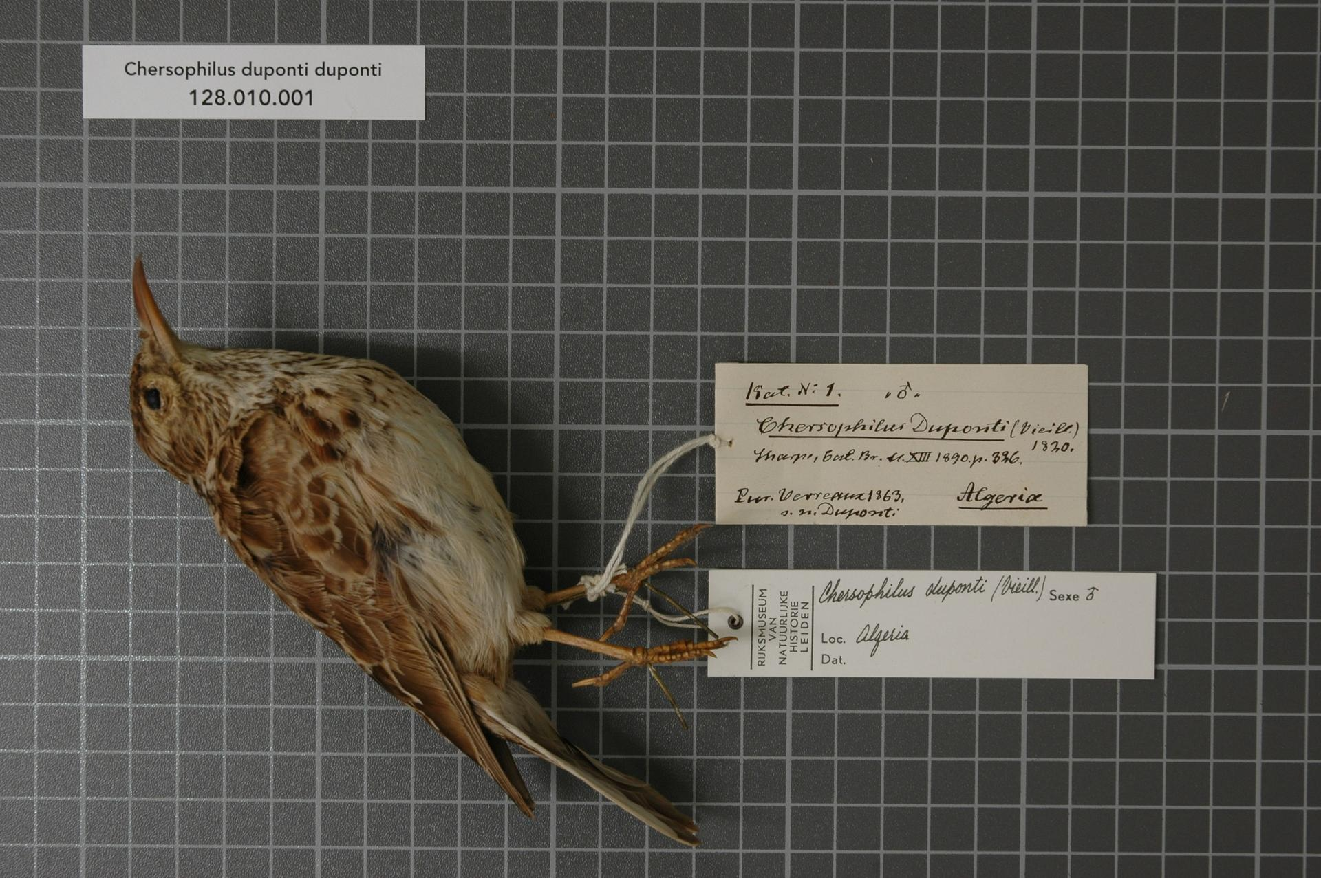 Chersophilus duponti duponti (Vieillot, 1820)